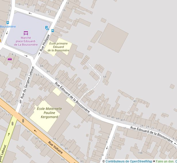 Quartier de La Boussinière au Mans (OpenStreetMap)